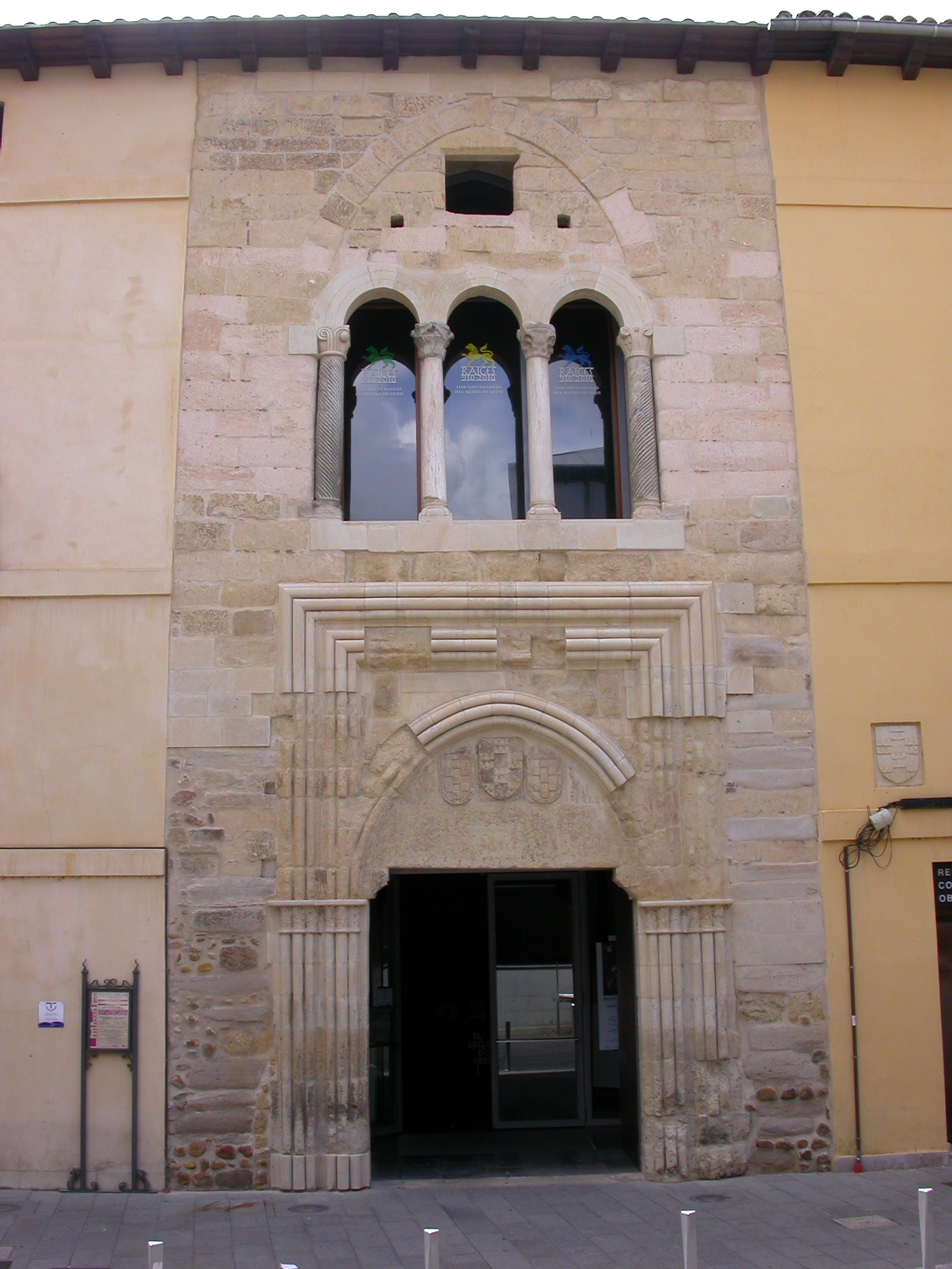 Este viejo palacio del siglo XIV, construido por Pedro Suárez de Quiñones y su esposa Juana González de Bazán, se conserva el cuerpo central de la fachada, con tres escudos, el central de los Quiñones y los laterales de los Bazán. Está construido de piedra sillería y tiene cerca de once metros de ancho.